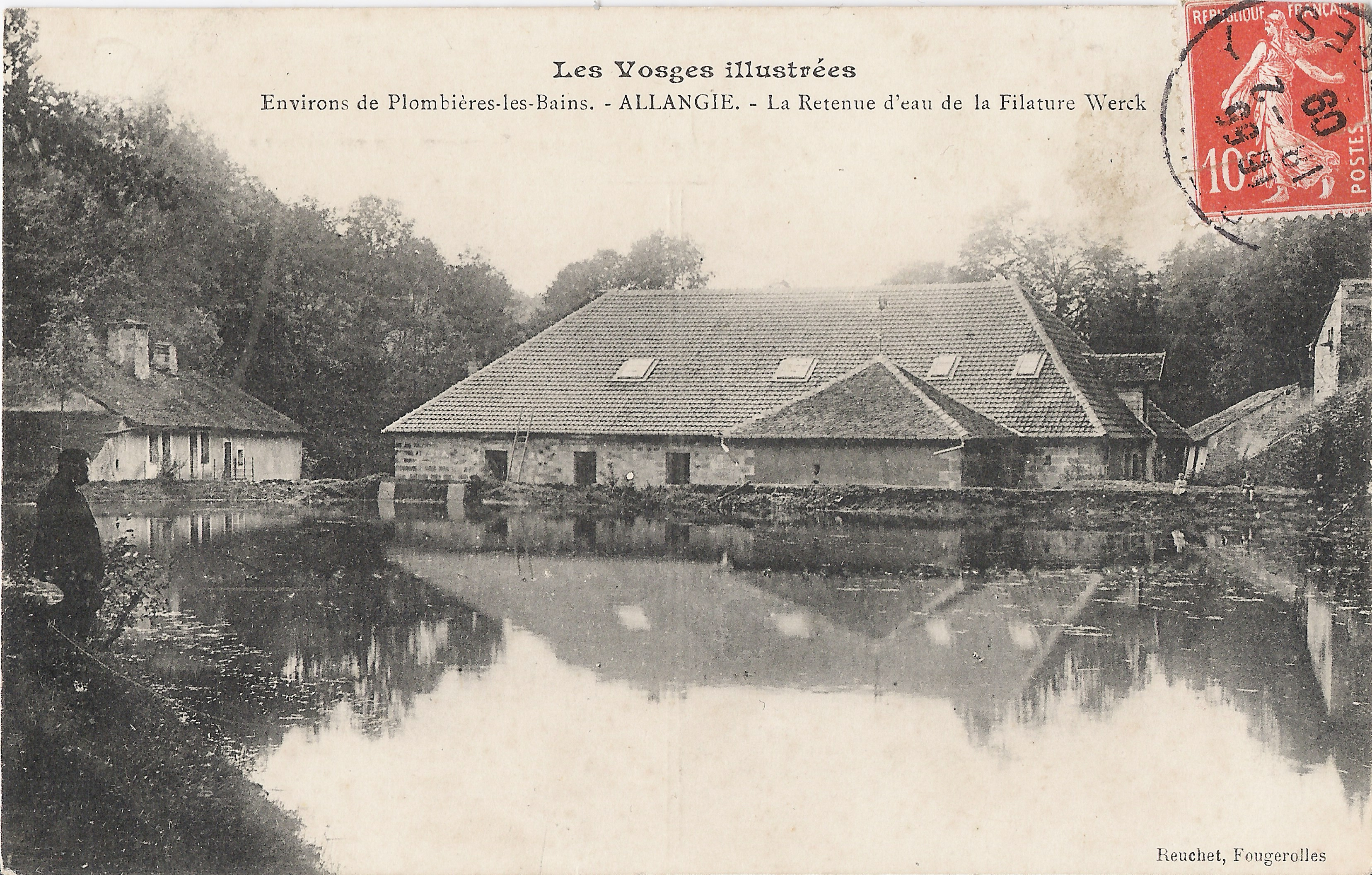 Vue de l'ancienne usine d'Allangie (ou Allongis) située sur la commune du Clerjus (Vosges). Ancienne forge de 1719 transformée en filature vers 1880 : Filature Désiré WERCK. Carte postale datée de 1909.